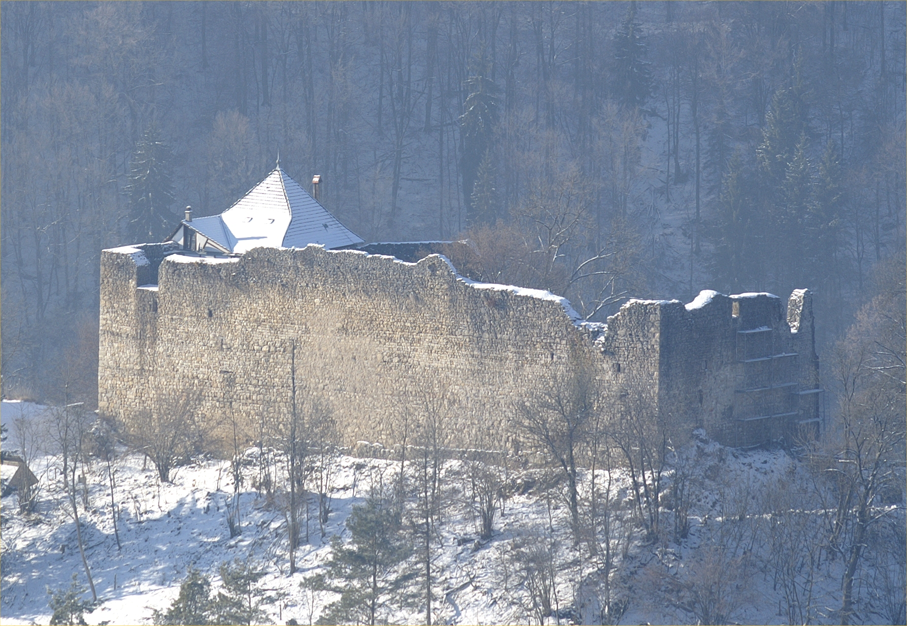 Burg Niedergundelfingen im Großen Lautertal